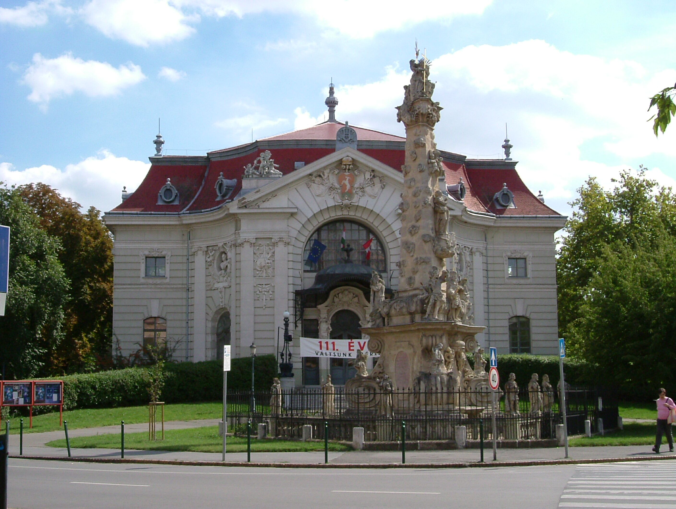 Katona József Színház, Kecskemét